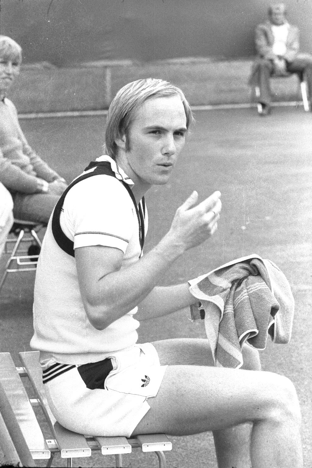 auf der Anlage des 1. Kieler Hockey- und Tennis-Clubs am Kopperpahler Teich 27. Im Bild der Tennisspieler und deutsche Vizemeister Andreas Maurer.